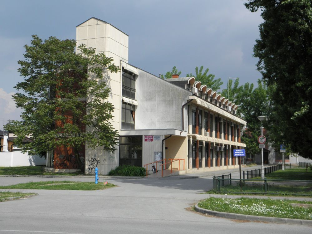 Dom zdravlja, Višnjevac. Svibanj, 2011.